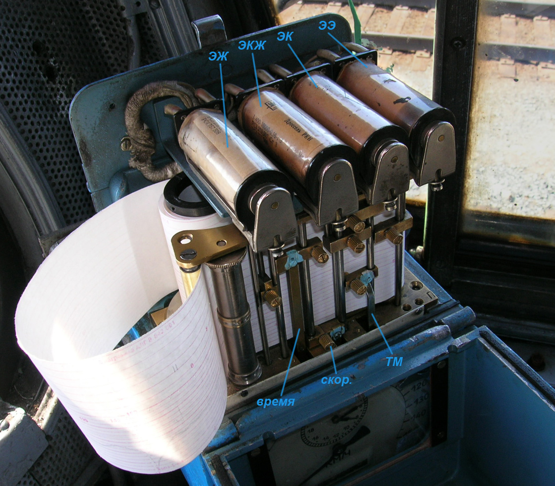 Регистрирующий скоростемер 3СЛ-2М тепловоза 2ТЭ116-415 депо Сургут СВЕРД ЖД